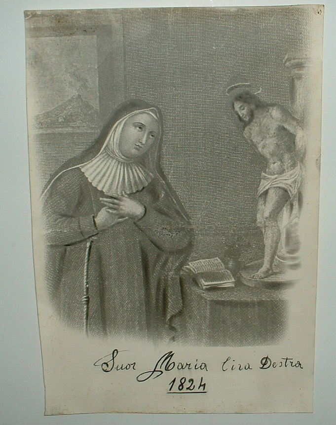 Raffigura una clarissa corleonese morta in fama di santità nel 1818.